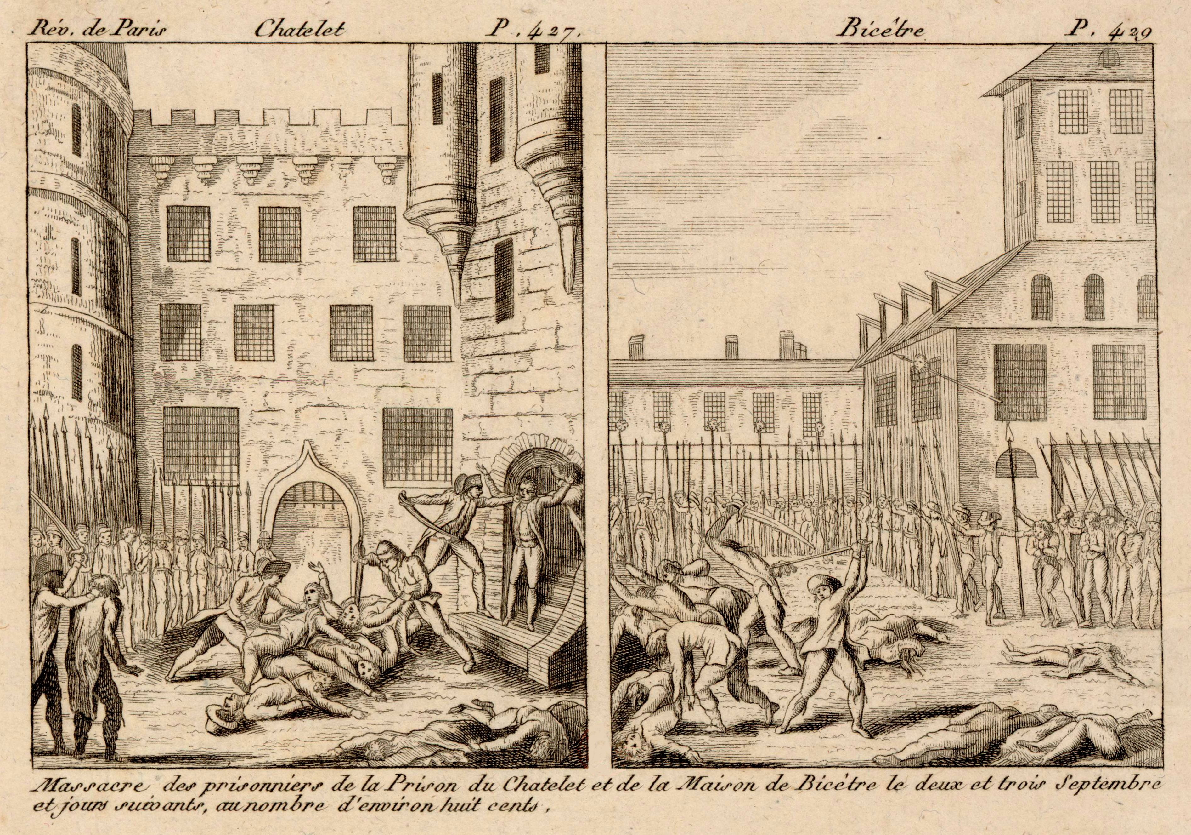 Estampe anonyme représentant les massacres de Septembre.